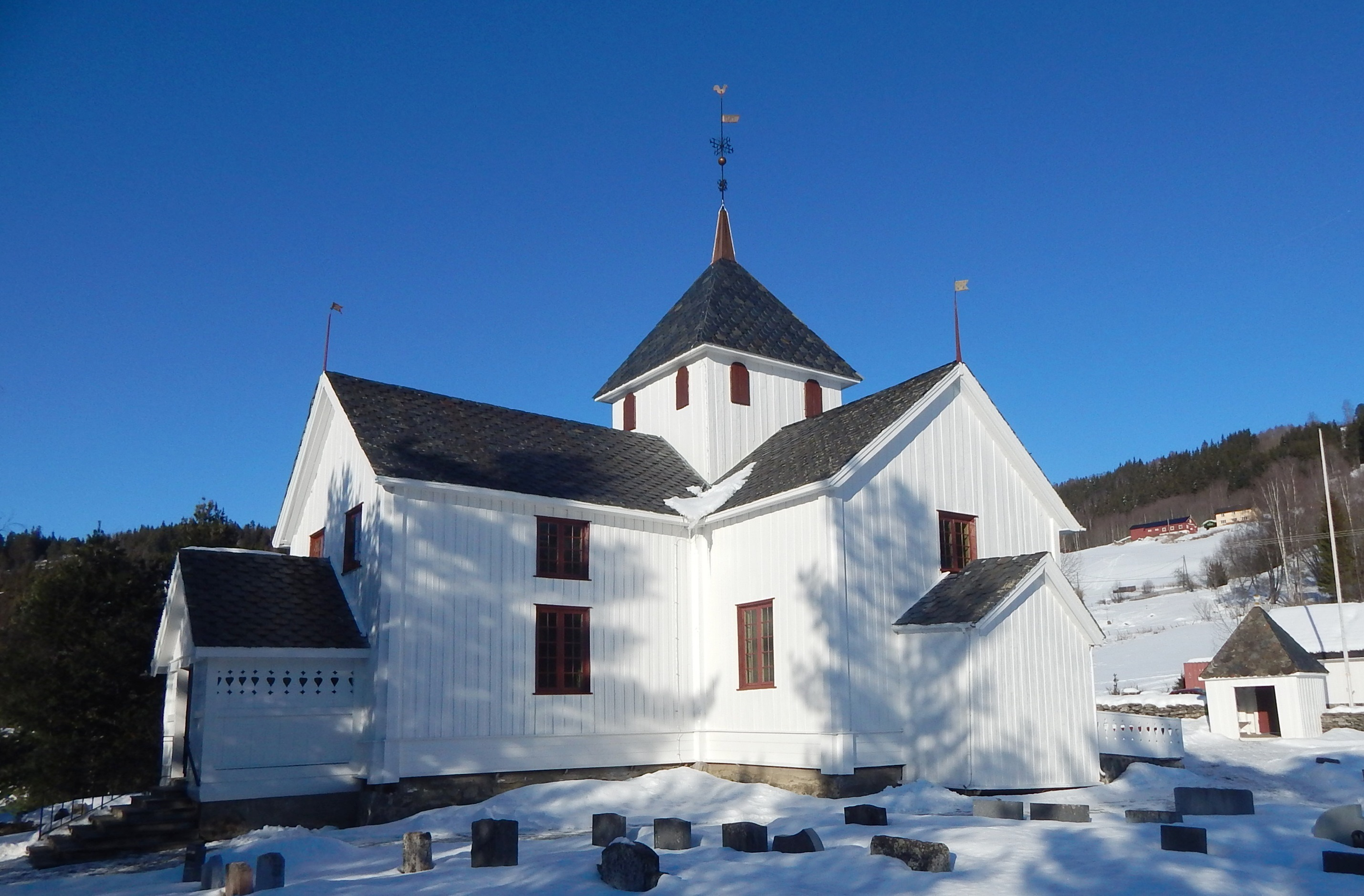 Tretten kirke med restaurert tårn